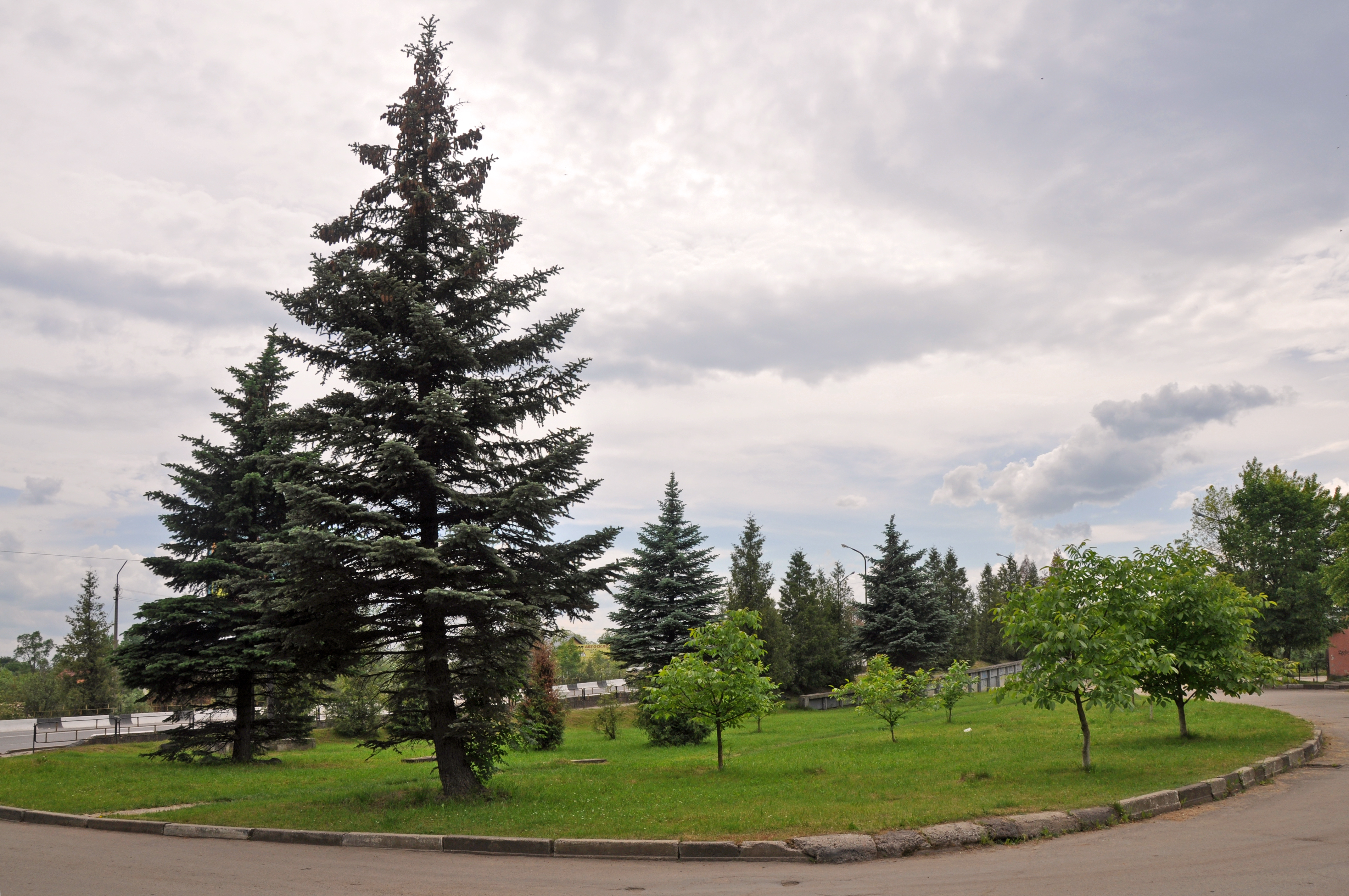 Група сріблястих смерек, м. Дрогобич, вул. Стрийська, 443